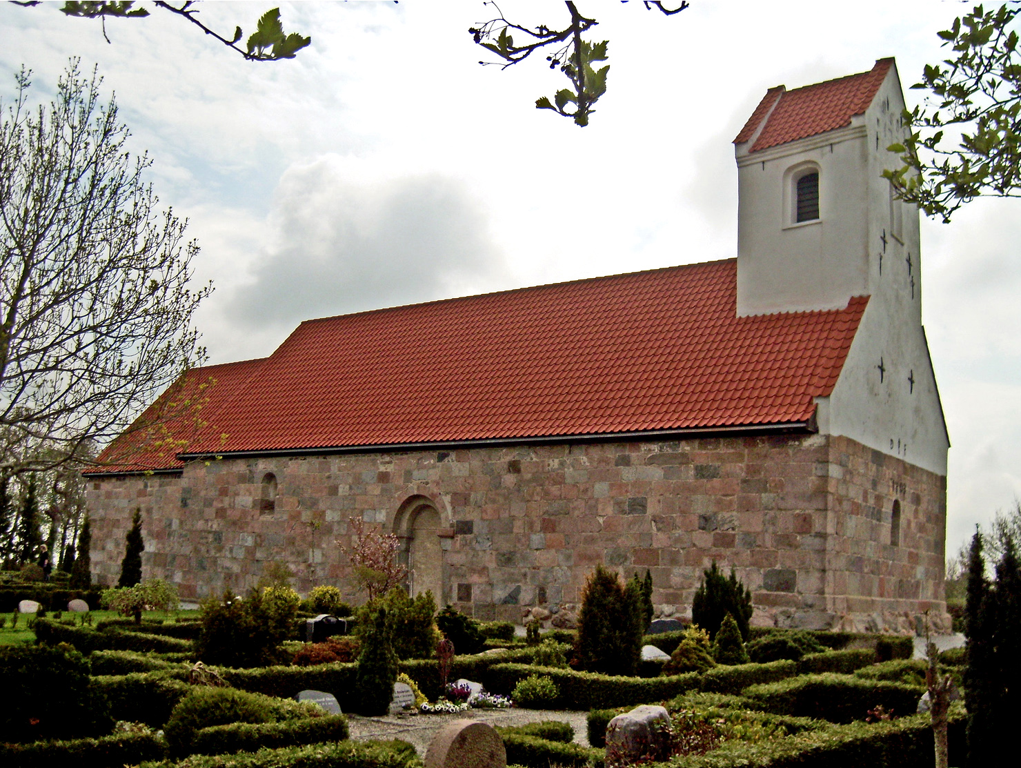 fra nordvest